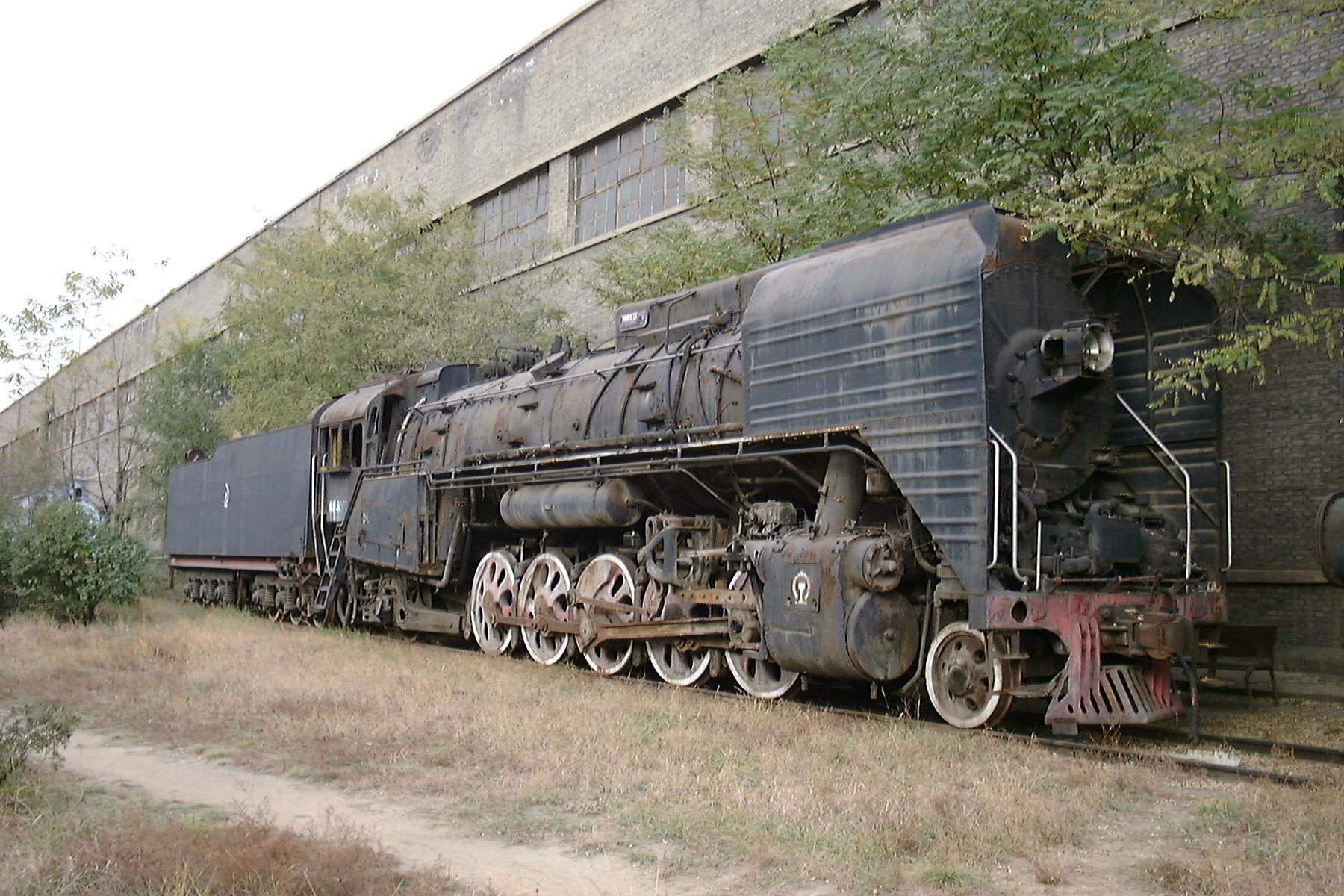 Datong railway museum